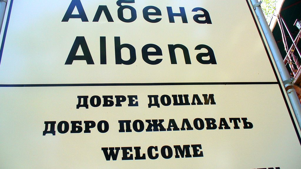 Enter sign in Albena